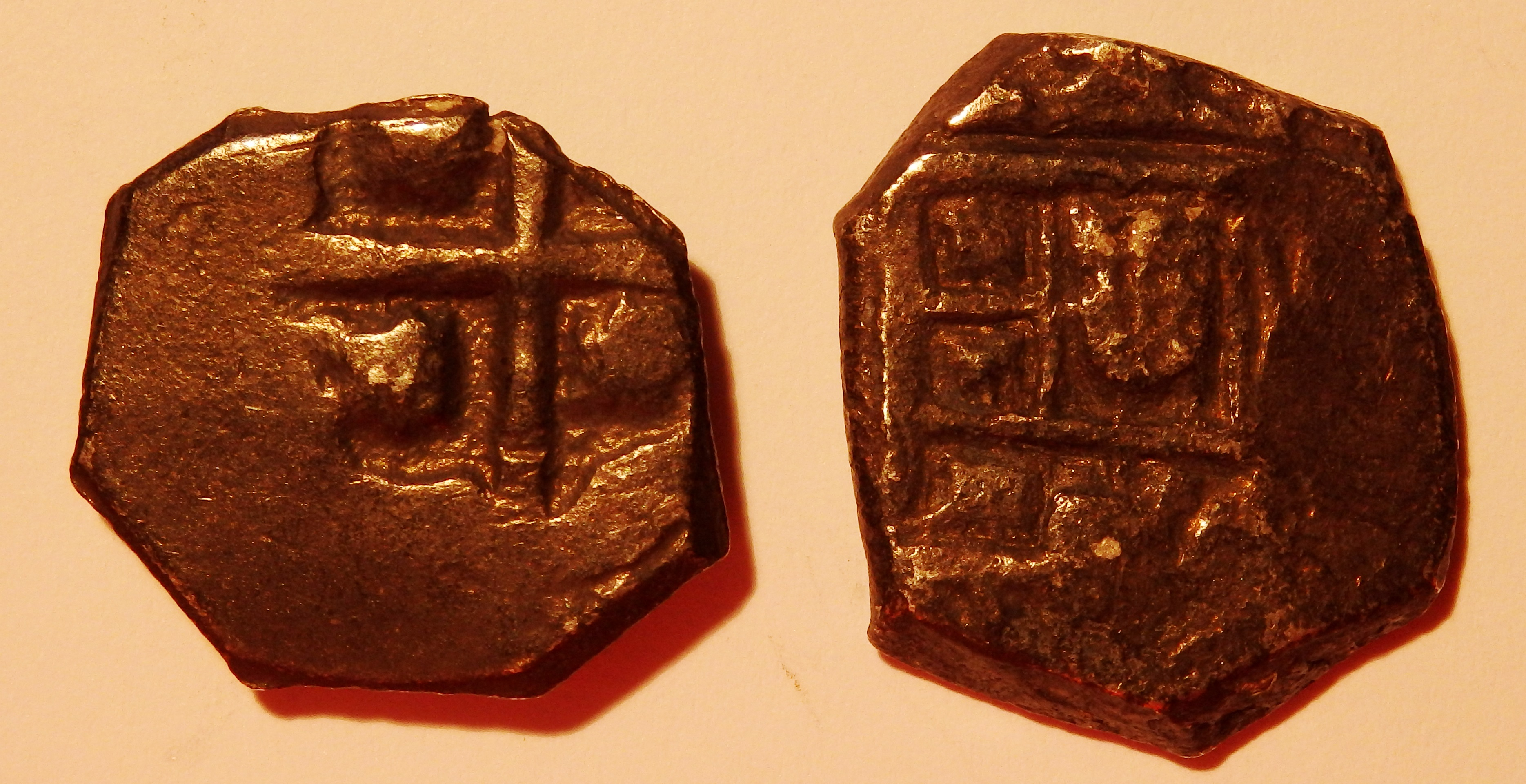 2 Zweirealesmünzen aus Potosi, z.Zt. Philipp IV.